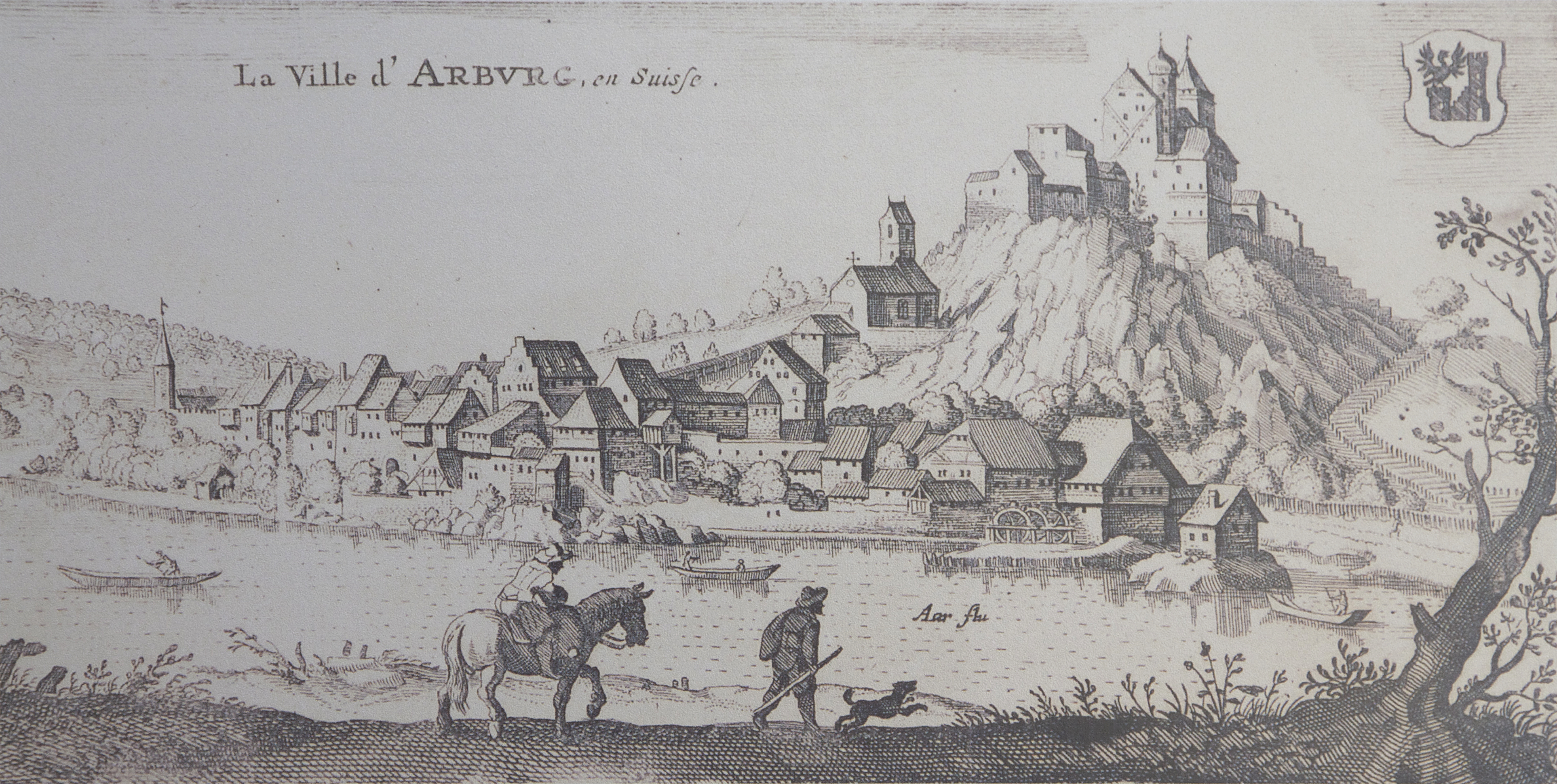 Die Festung Aarburg und nach Matthäus Merian. Fotografiert von einer Informationstafel bei der Festung. Version ohne Bildkommentar.